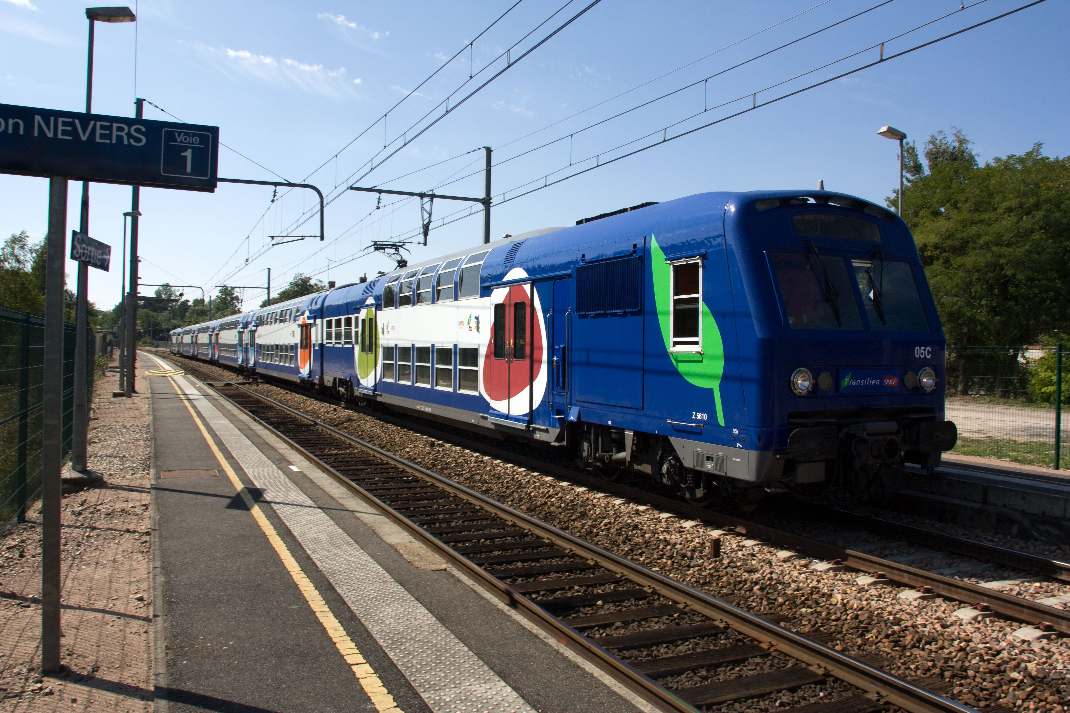 Gare de Bourron-Marlotte - Grez. Montigny-sur-Loing, Seine-et-Marne, France.